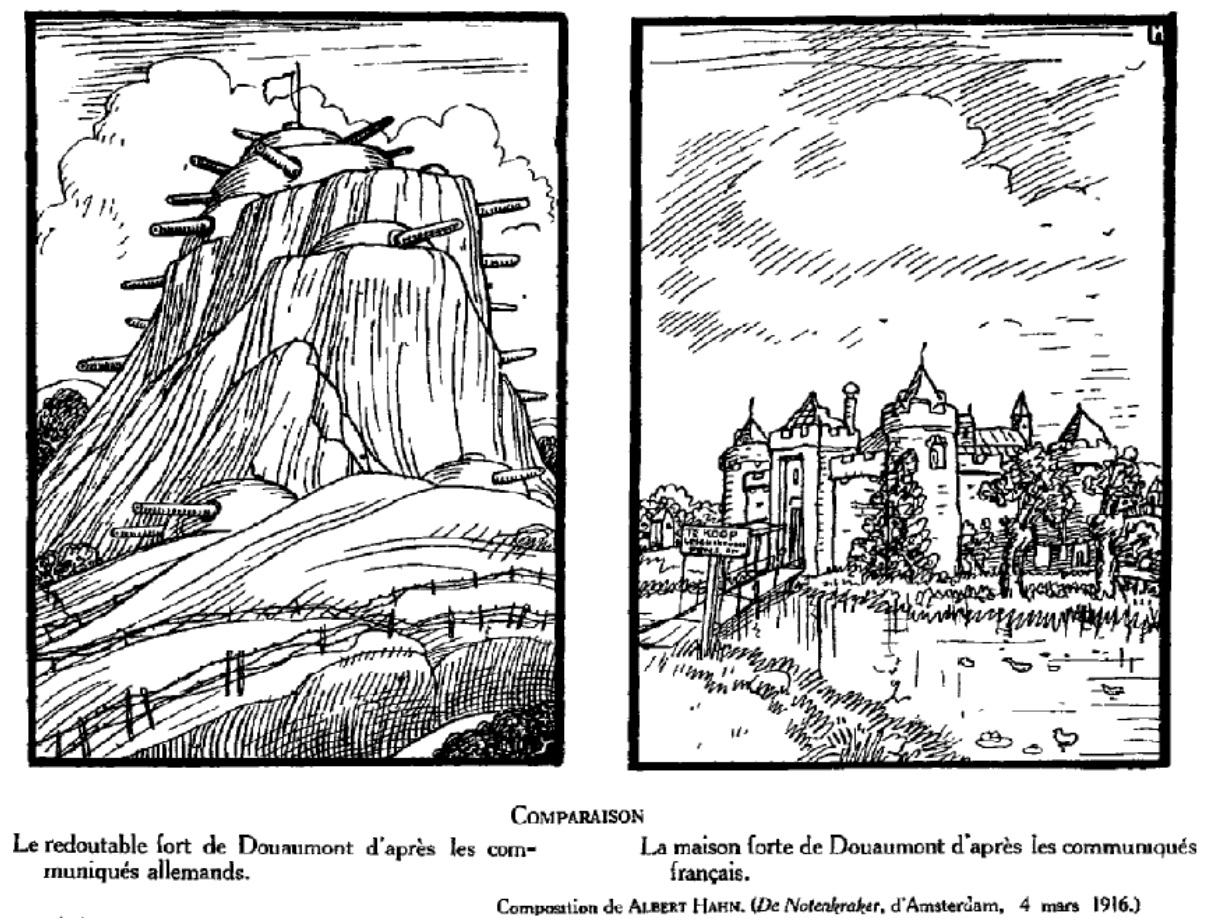 Caricature néerlandaise sur les communiqués de la prise de Douaumont, « Comparaison : le redoutable fort de Douaumont d'après les communiqués allemands ; la maison forte de Douaumont d'après les communiqués français ». Publié dans De Notenkraker à Amsterdam, le 4 mars 1916.